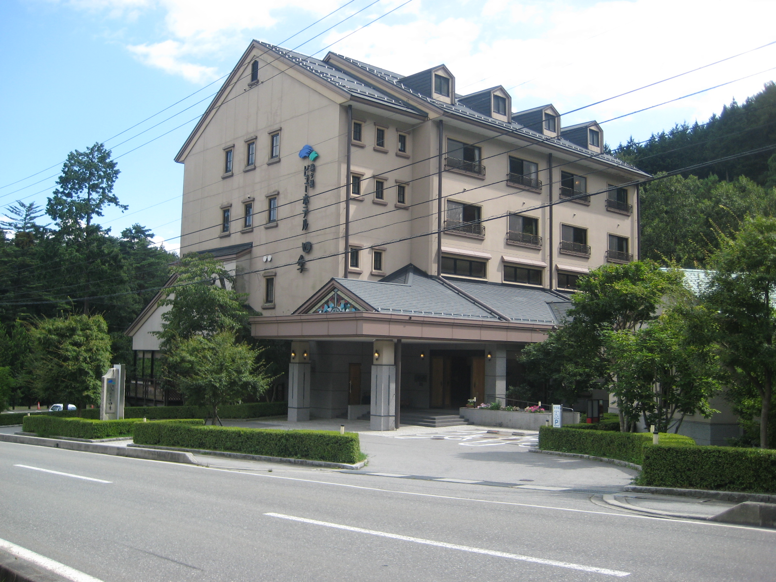 駒ヶ根ビューホテル四季